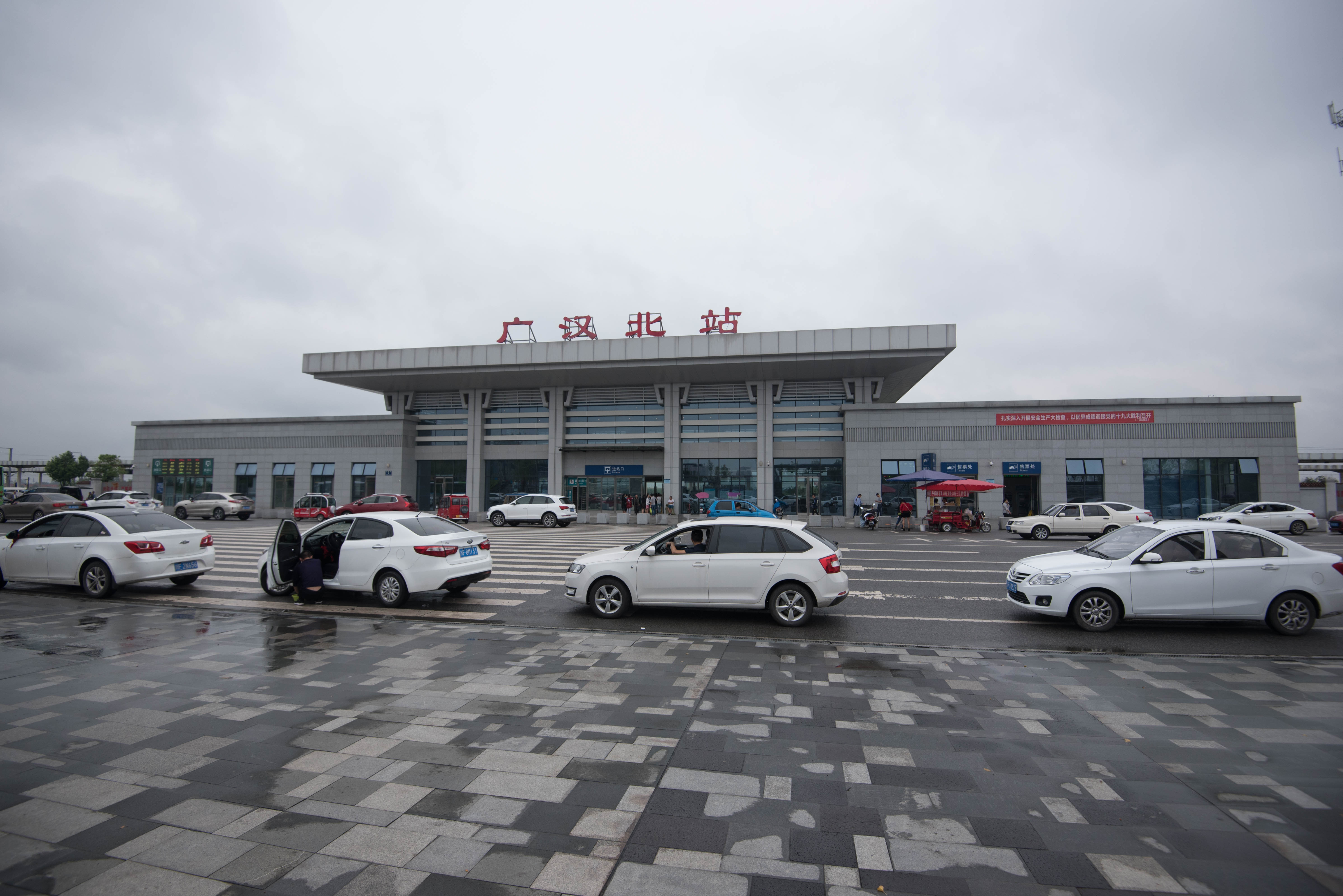 广汉北站站房